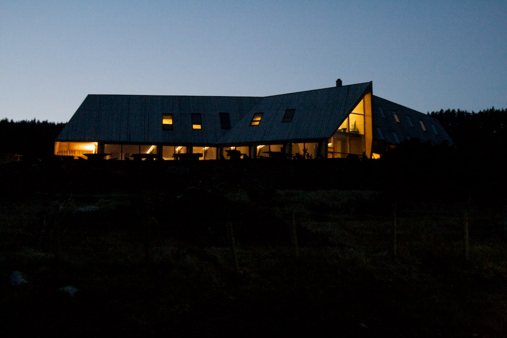 Åpning av Preikestolhytta og Preikestolen BaseCamp